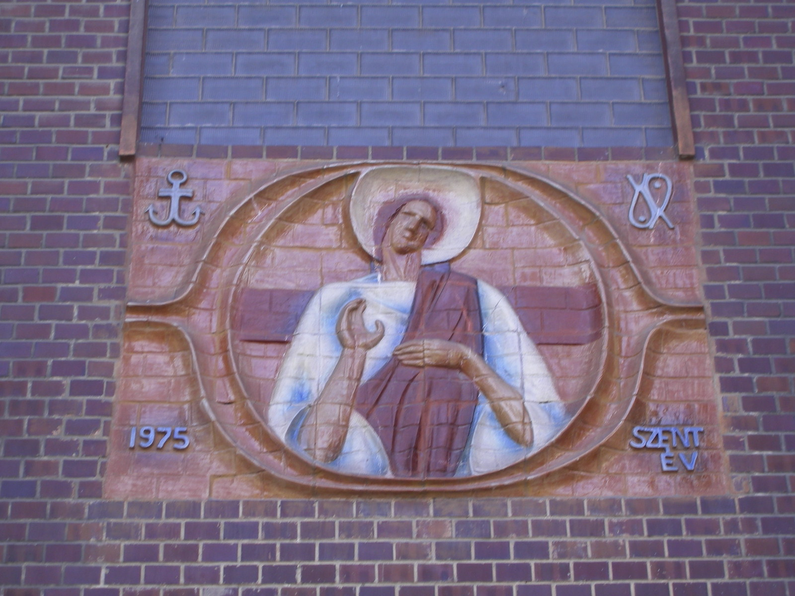 Dél-Komárom - Jézus Szíve-templom - részlet